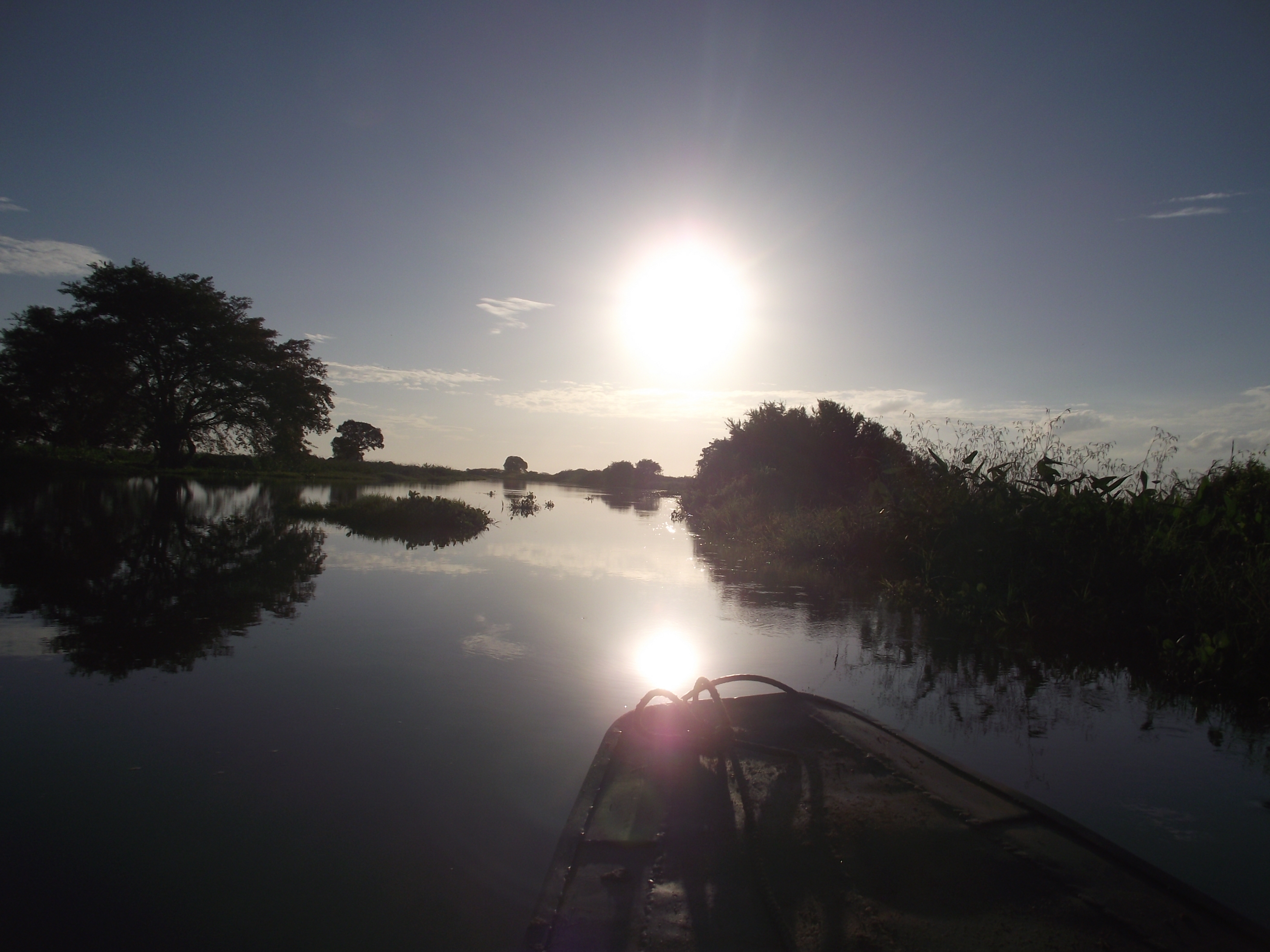 Pansegüia-Bolivar. Esta fotografía fue tomada en el municipio colombiano con código 13430.